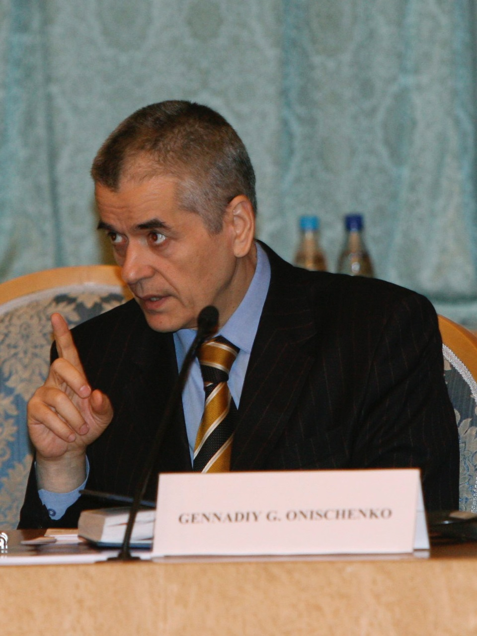 Геннадий Онищенко на международной конференции "Глобальная угроза - глобальные действия. Содействие реализации инициатив "Группы восьми" по борьбе с инфекционными болезнями" в Москве.